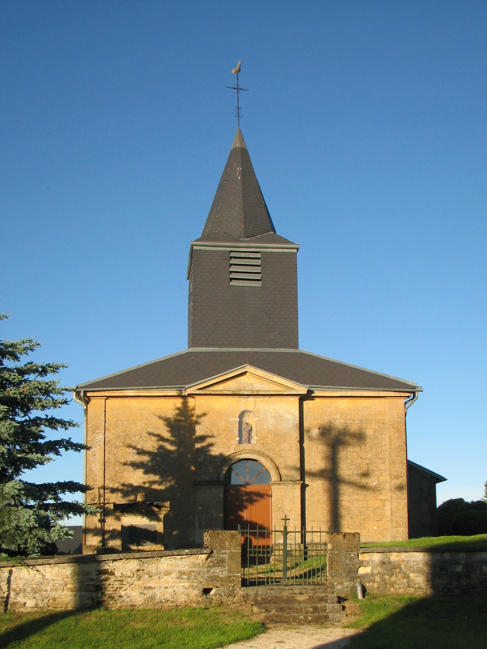 église de Germont dans les Ardennes